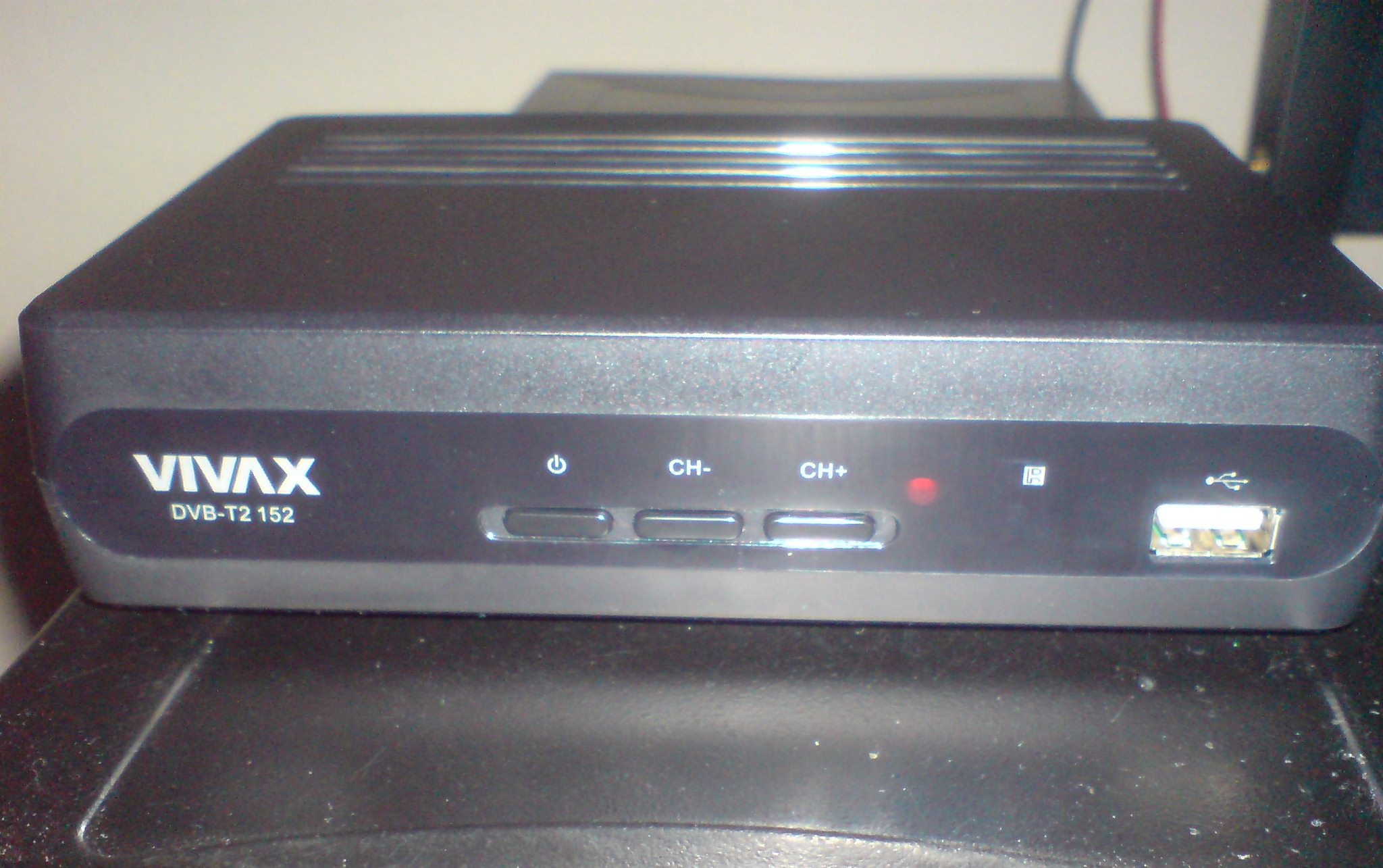 Vivax DVB-T2 152 prijemnik DVB-T2 zemaljske televizije